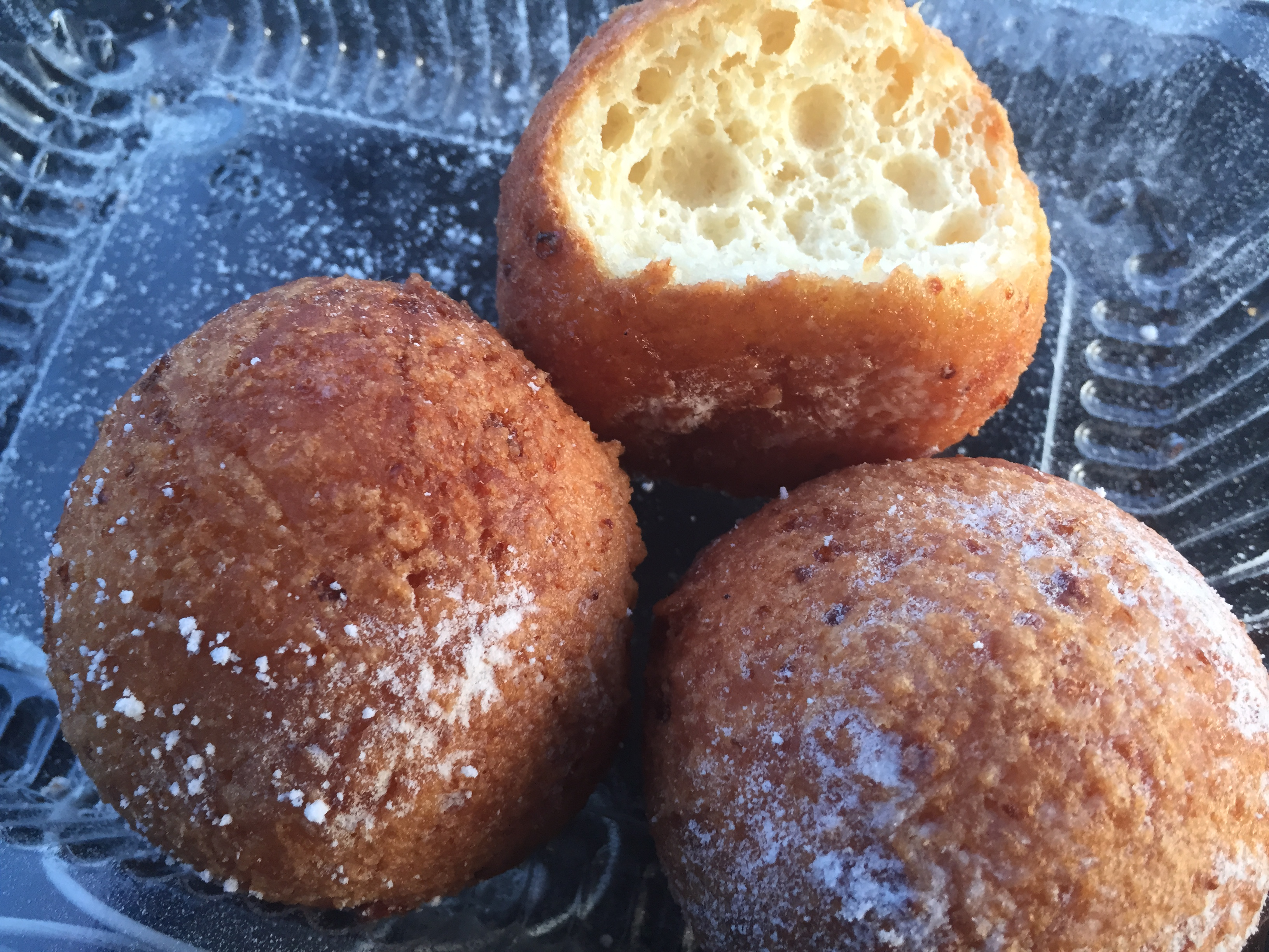 Varškinės spurgos